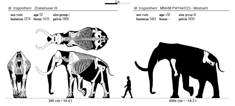 Mammuthus trogontherii dimensions